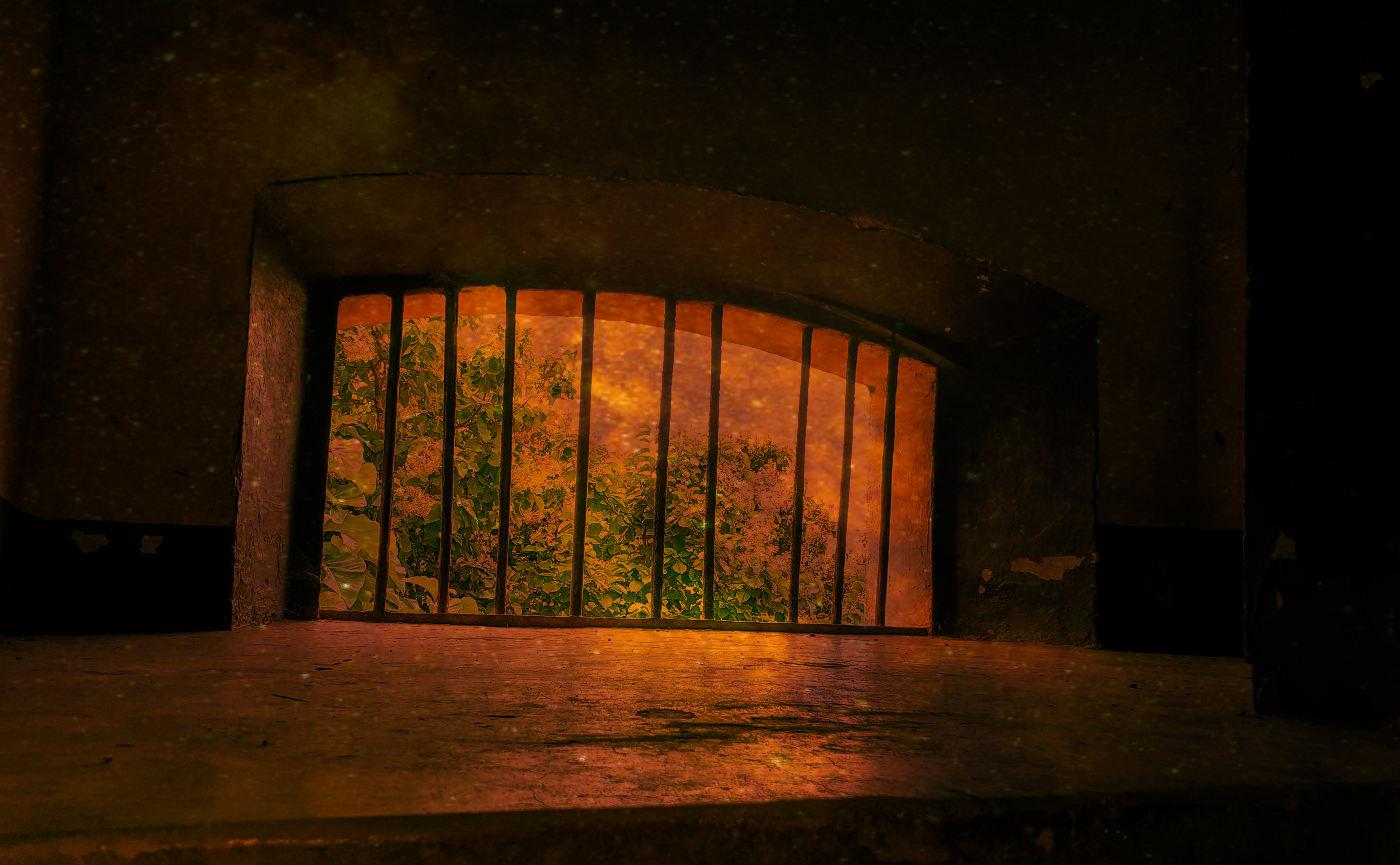 Fenêtre du musée, Depicted place: Musée de Boké